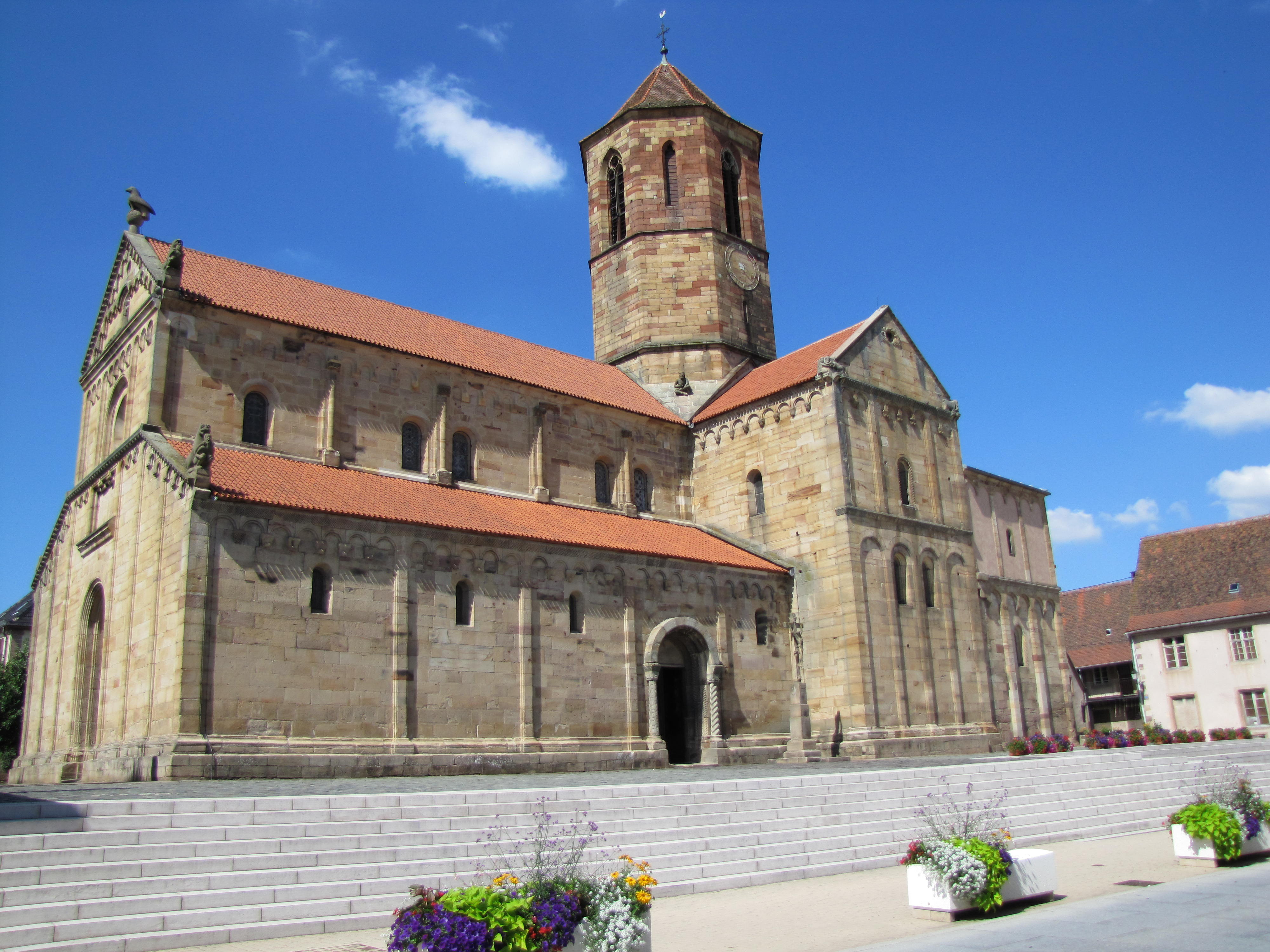 Alsace, Bas-Rhin, Rosheim, Église romane Saints-Pierre-et-Paul (XIIe) (PA00084909, IA00075638).